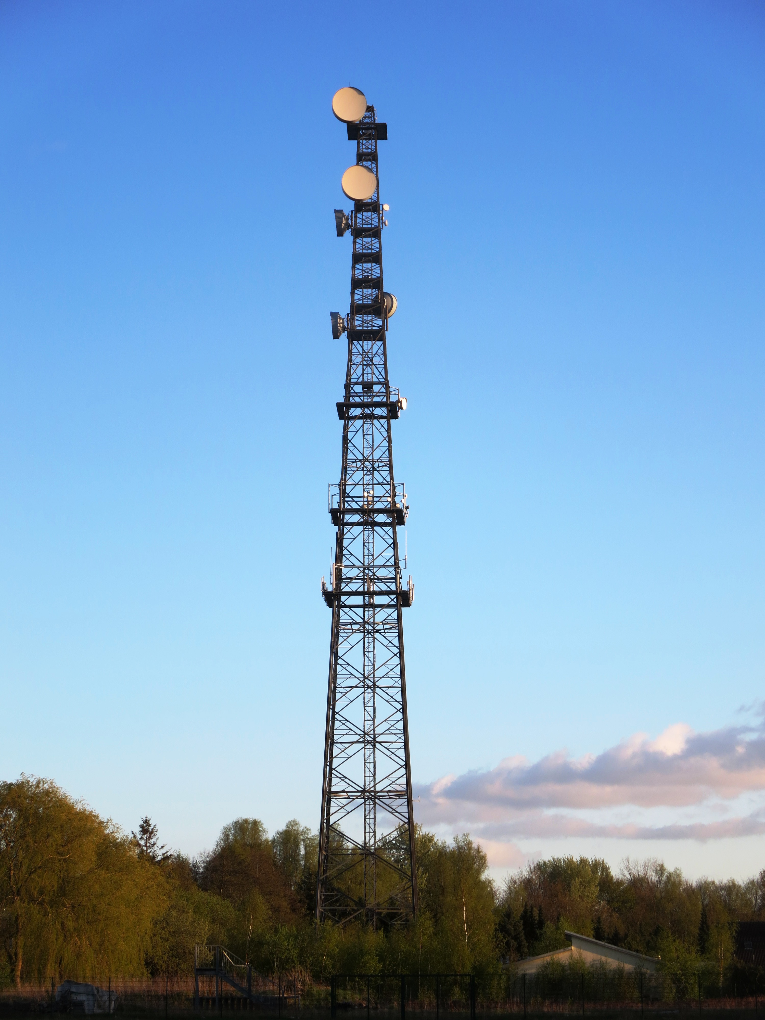 Mobilfunksendeanlage in Drielake